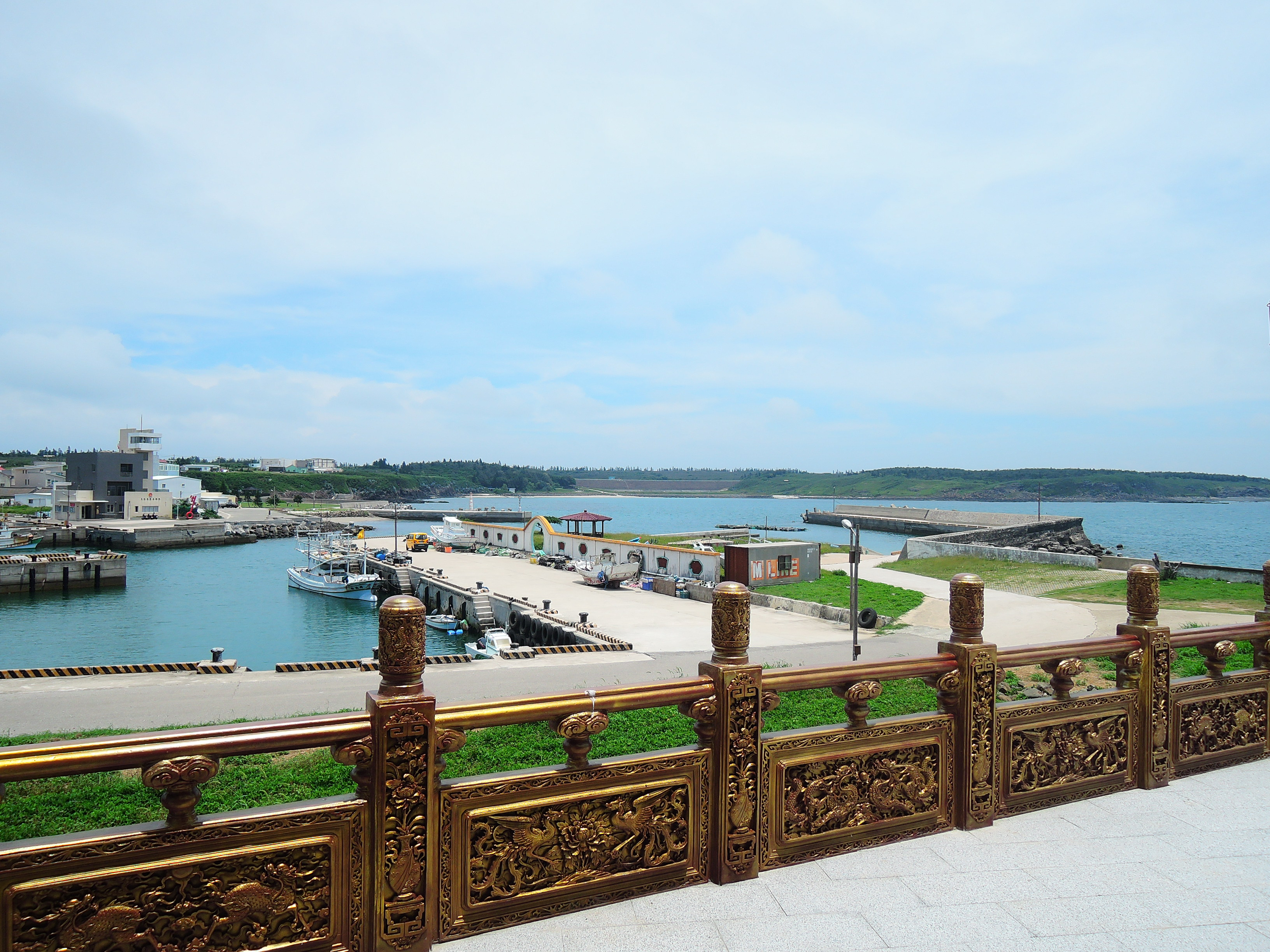 台灣澎湖西嶼鄉大池村的土地公廟之一（漁港東側）